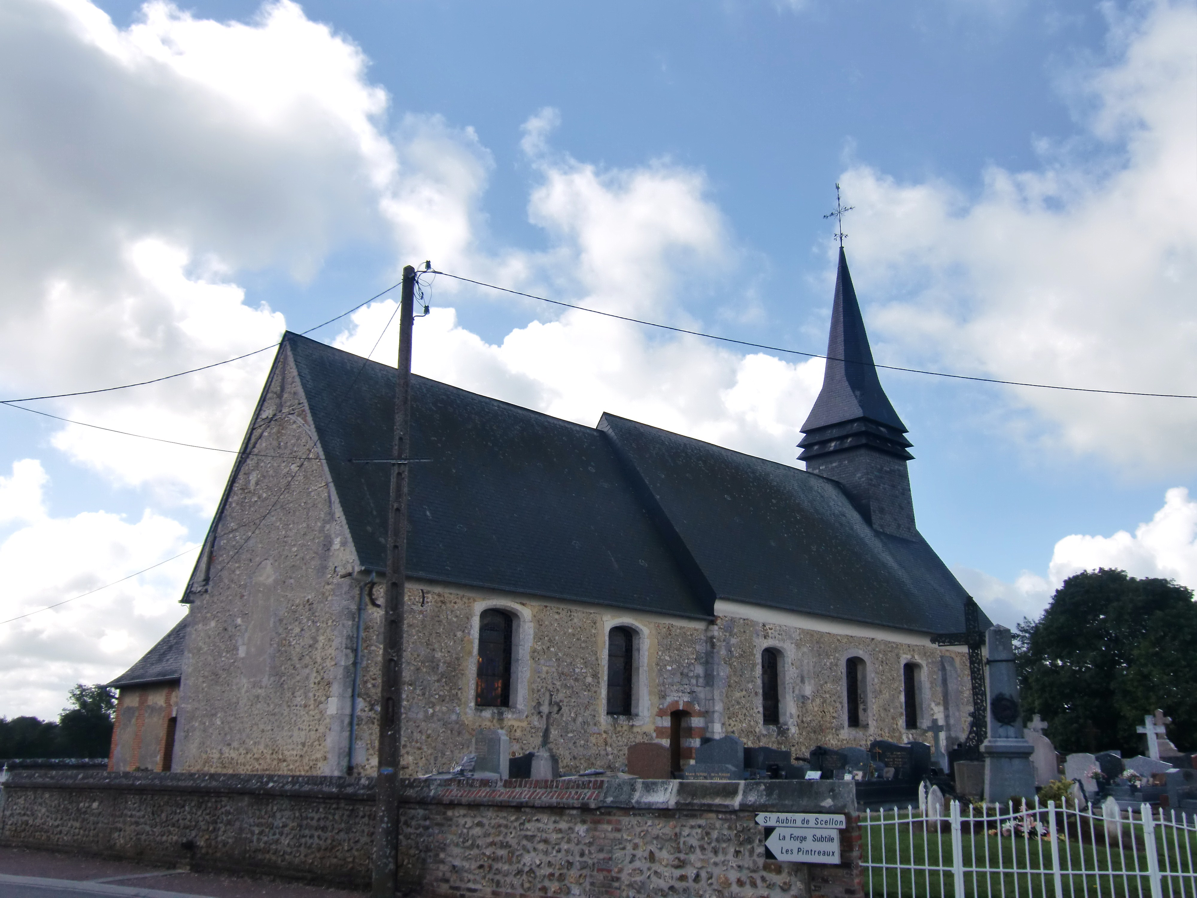 église de Fresne-Cauverville (Eure, Normandie, France)